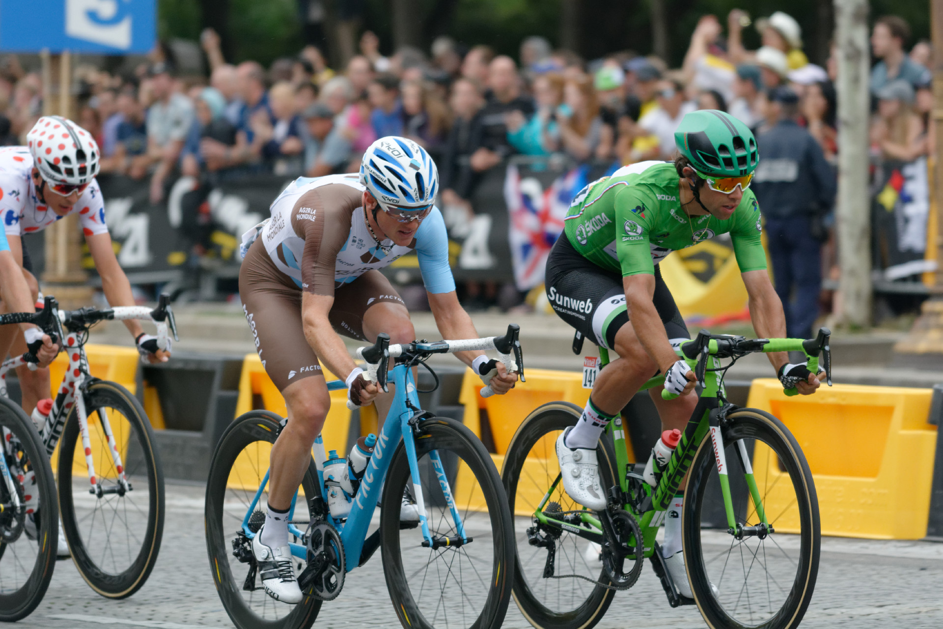 D71_9070_DxO